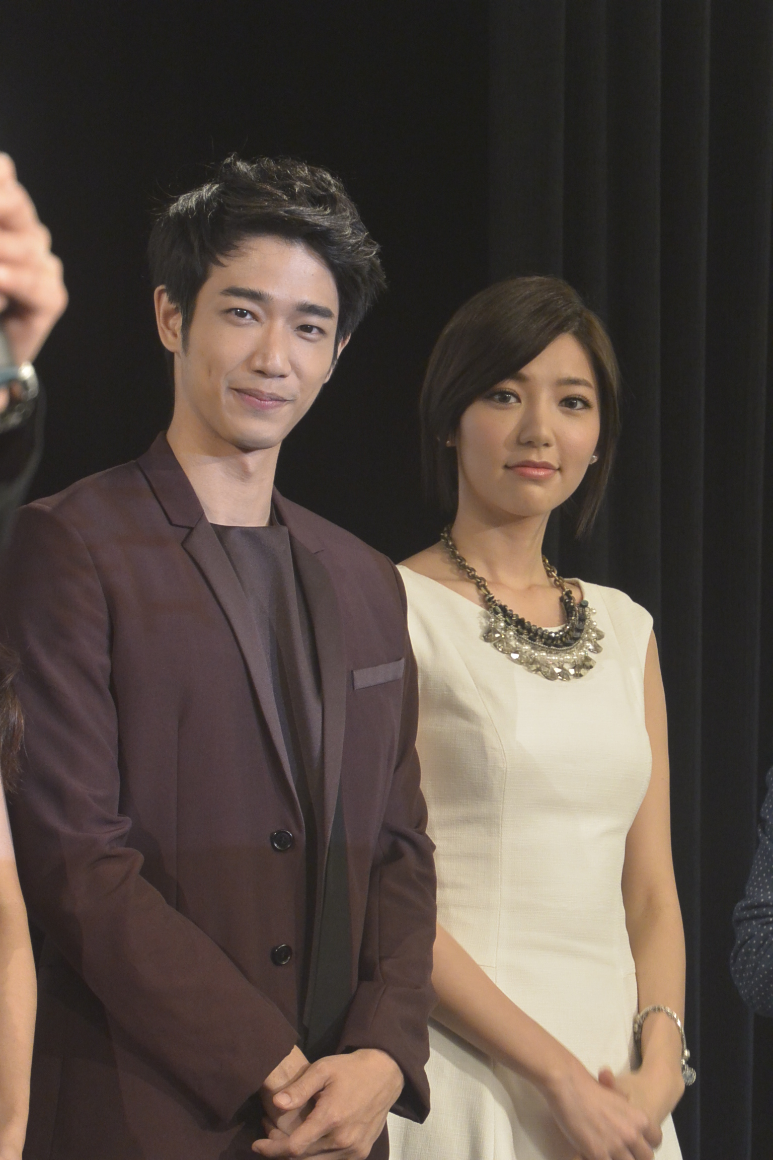 喜歡．一個人 首映會